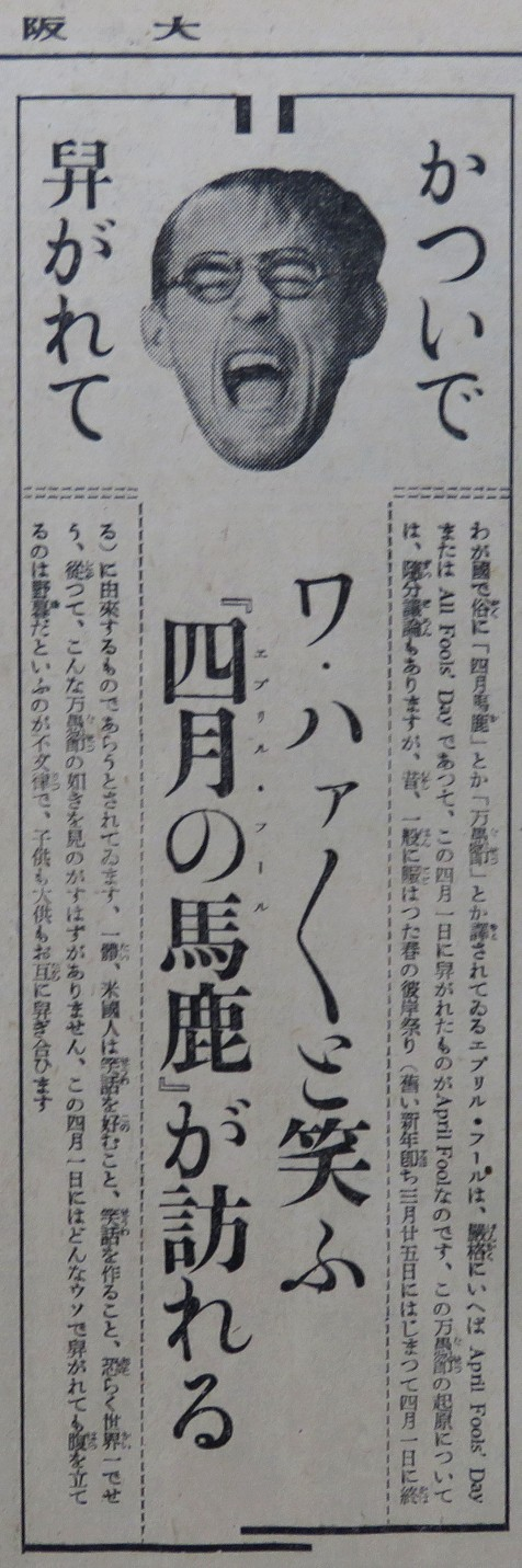 大阪毎日新聞でのエイプリルフールの紹介。